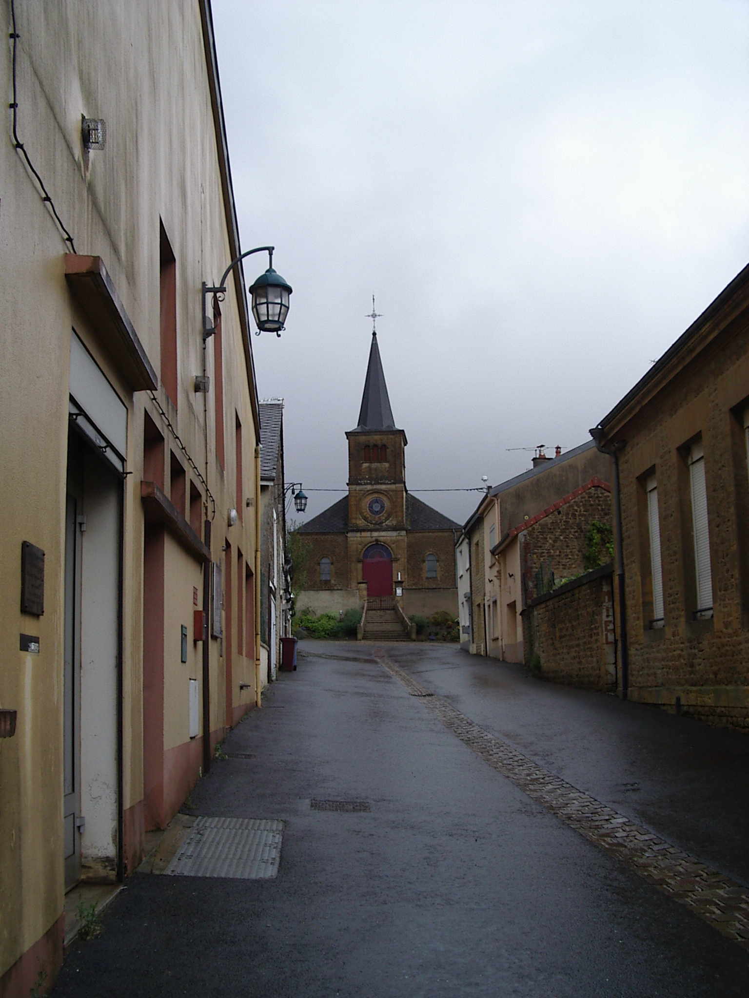 Ville-sur-Lumes, departement des Ardennes, France.